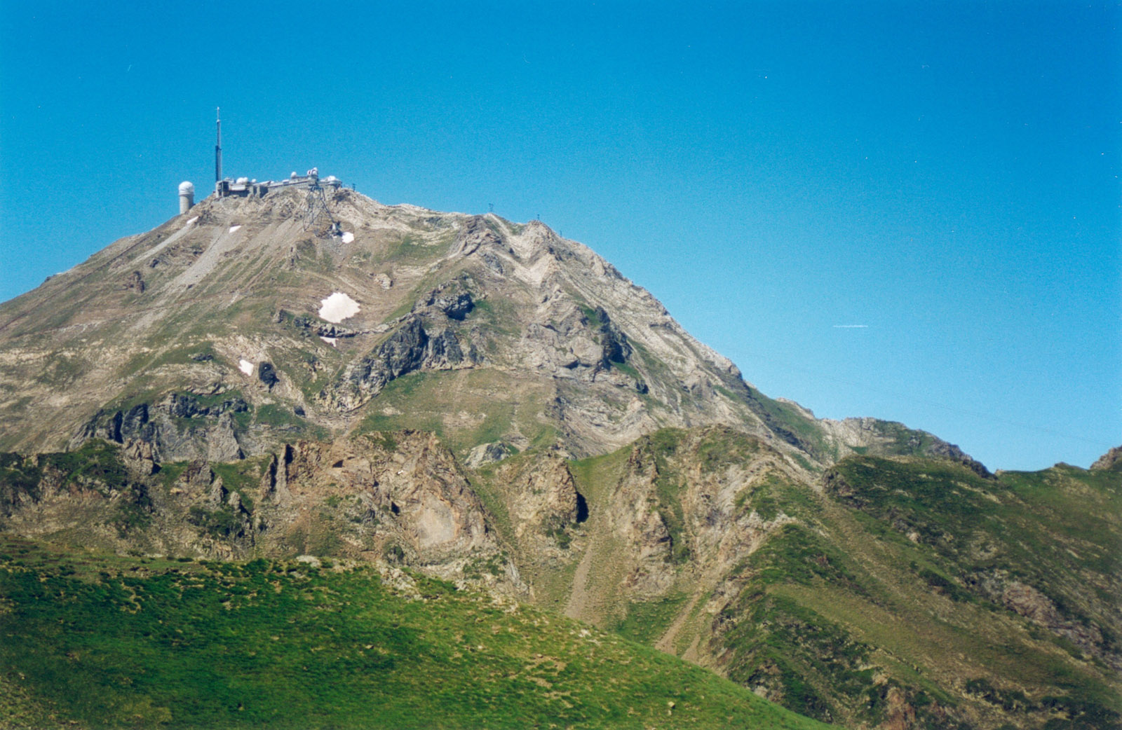 Le Pic du Midi de Bigorre Auteur : GIRAUD Patrick